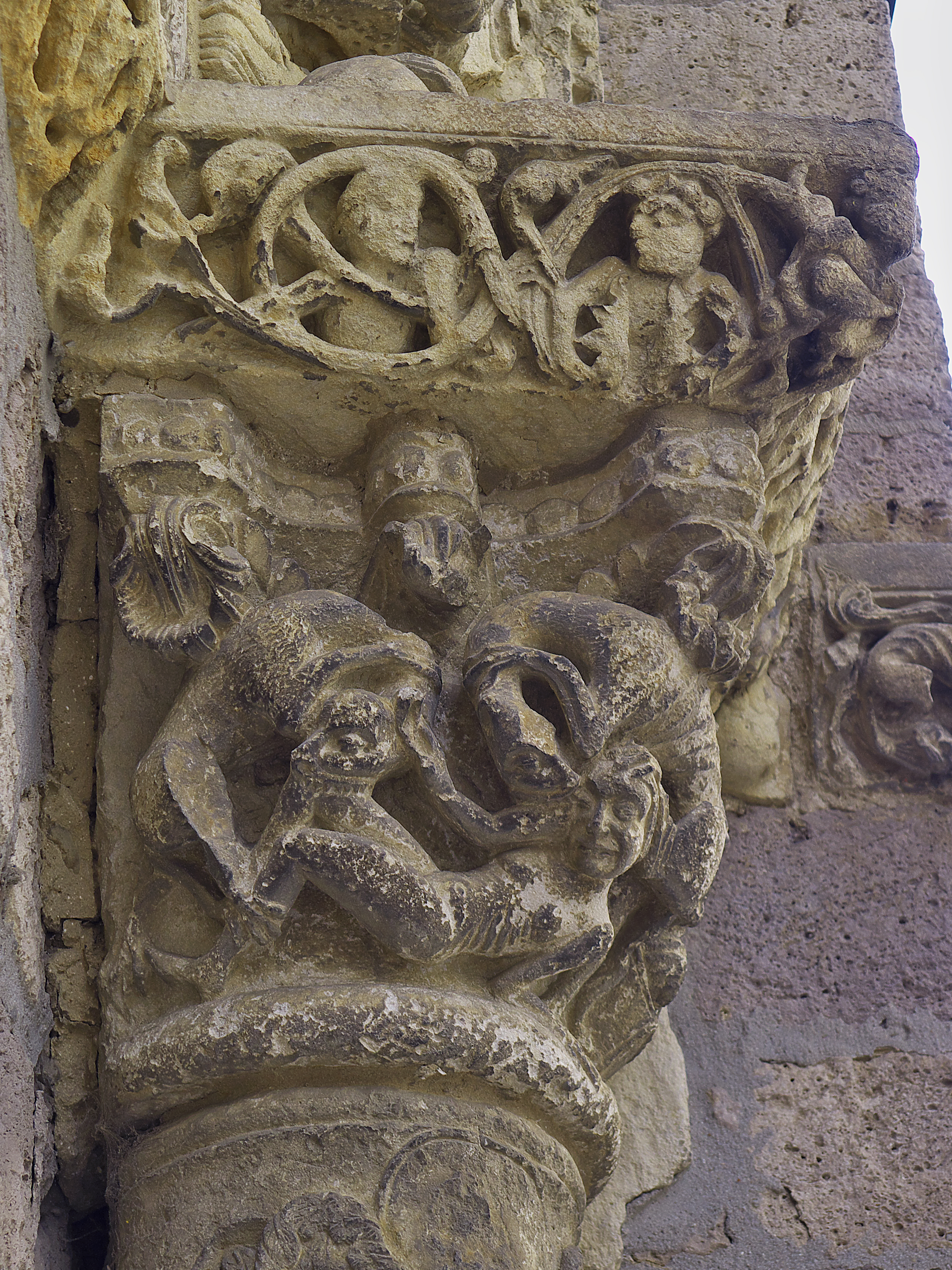 Capitel sur en la portada de los pies de la iglesia. Dos monstruos atacan a una persona desnuda, desarrollando un extraordinario relieve (s. XII)